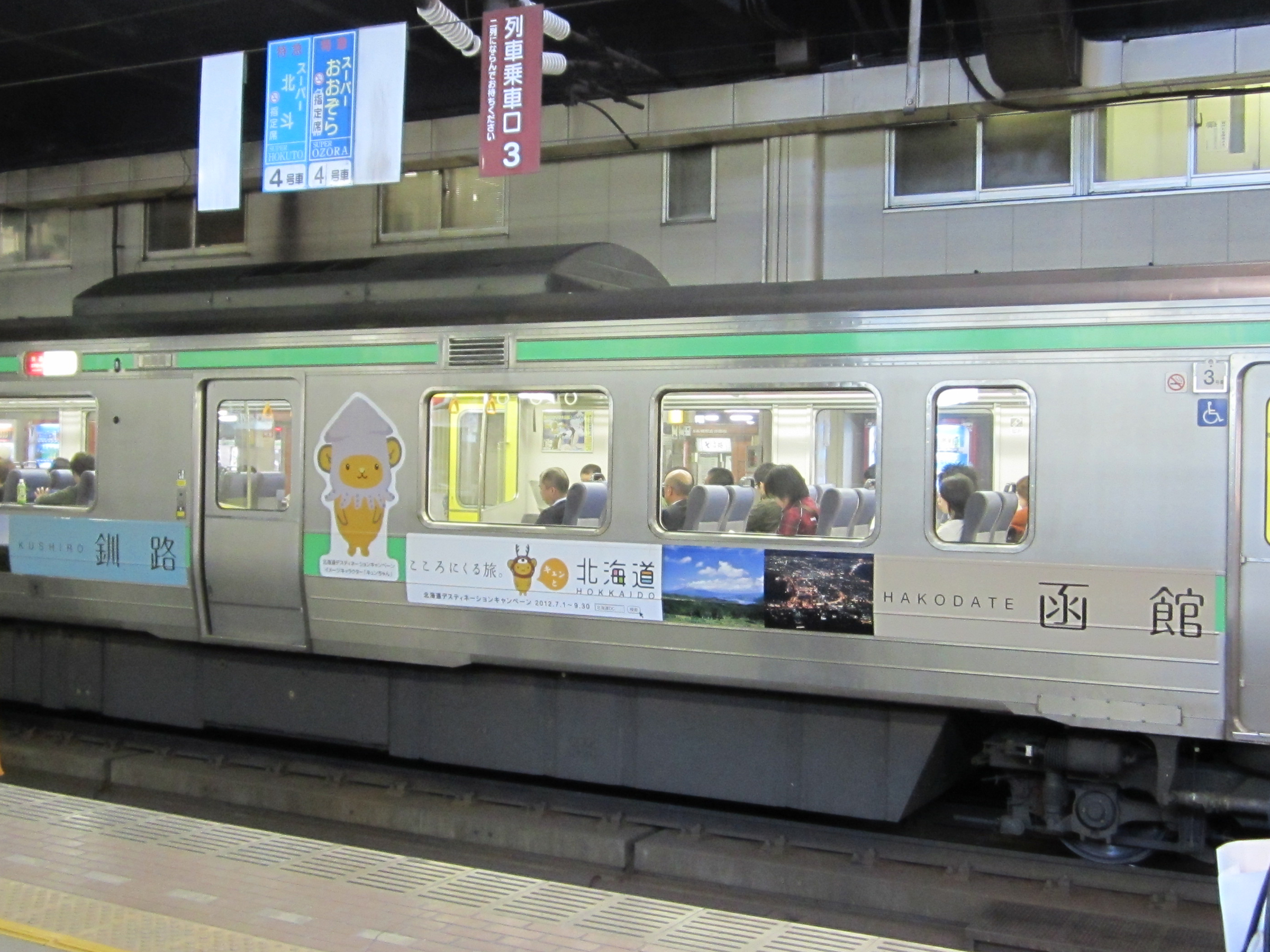 JR北海道2012年ディスティネーションキャンペーンが彩られた721系電車